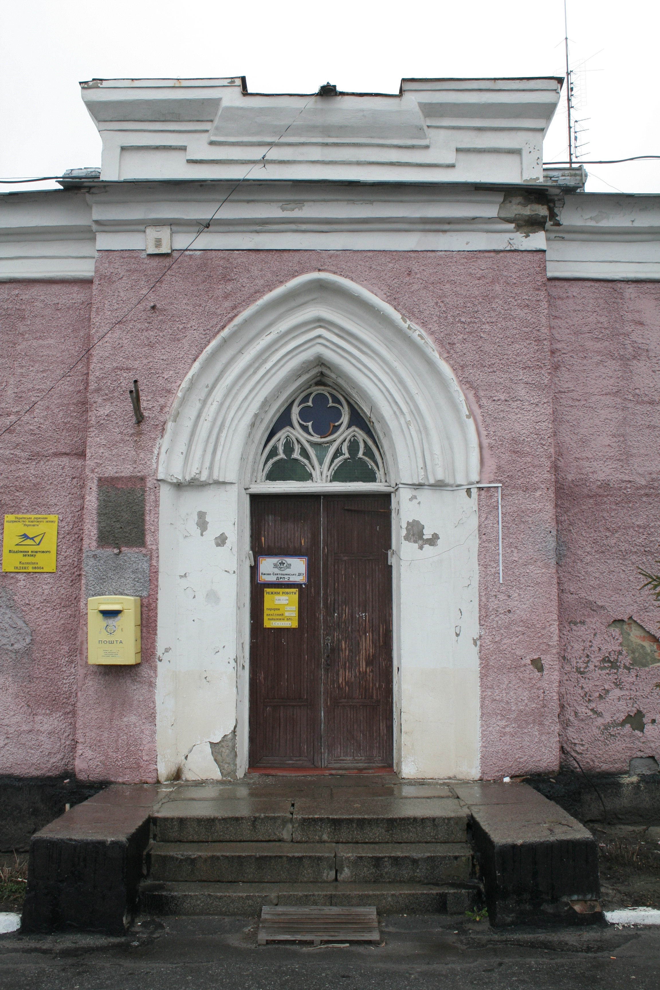 шосе Житомир-Київ, 53 км, с.Калинівка, Поштова станція №3, вхідна група